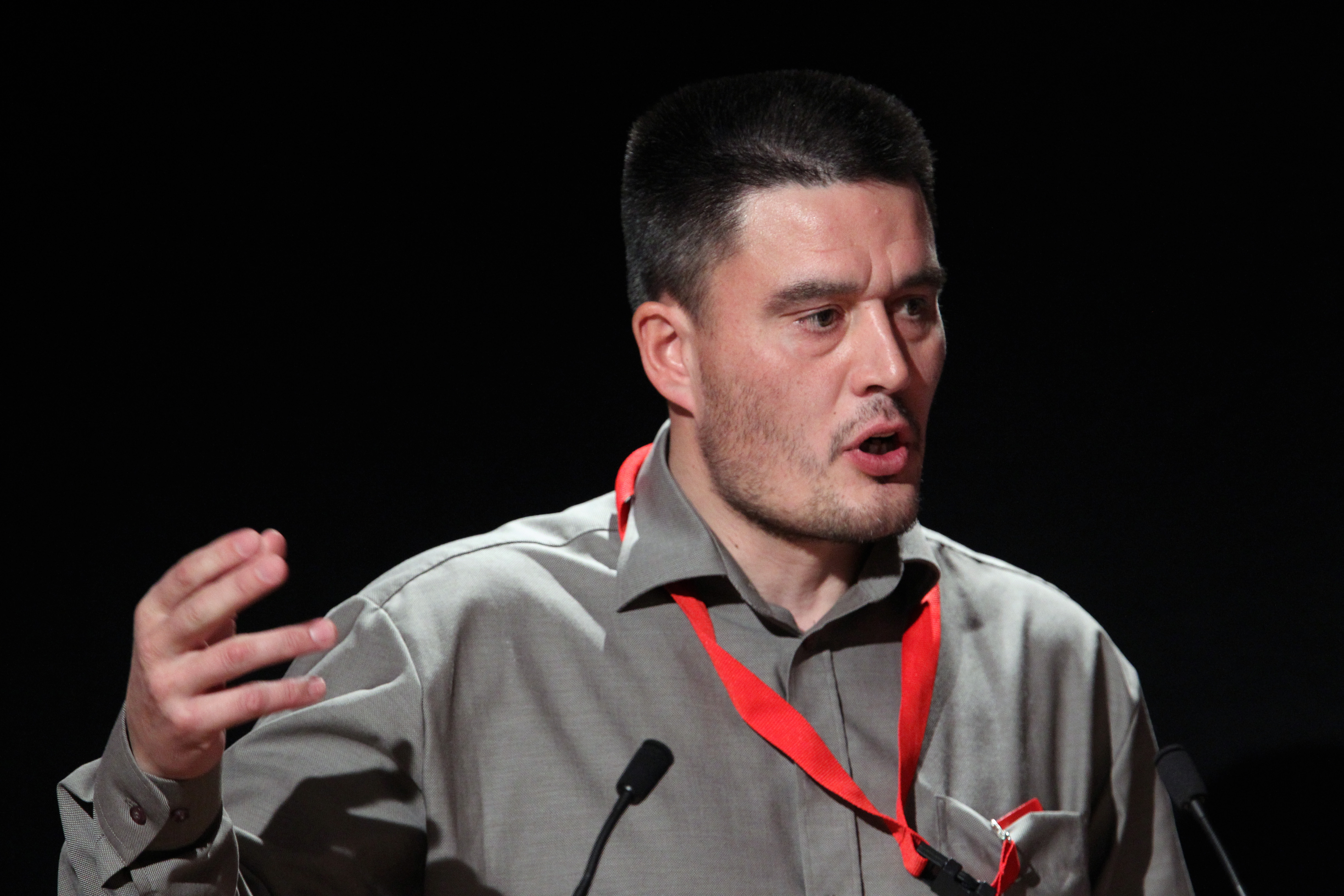 Kim Kielsen, Siumut (S) Grönland. Nordiska rådets session i Reykjavik 2010.